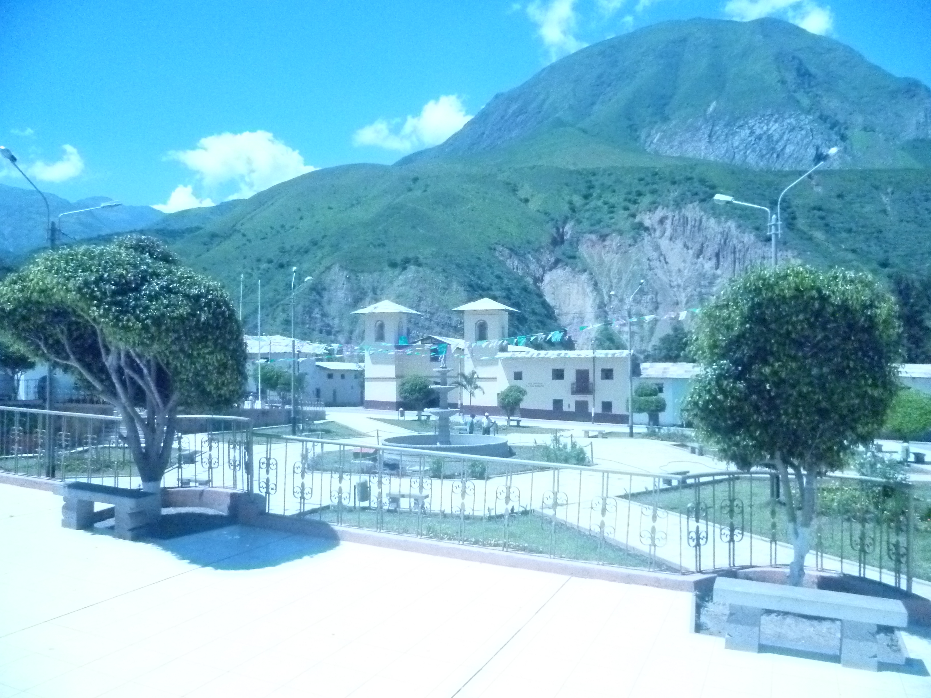 Plaza de armas del Distrito de Magdalena